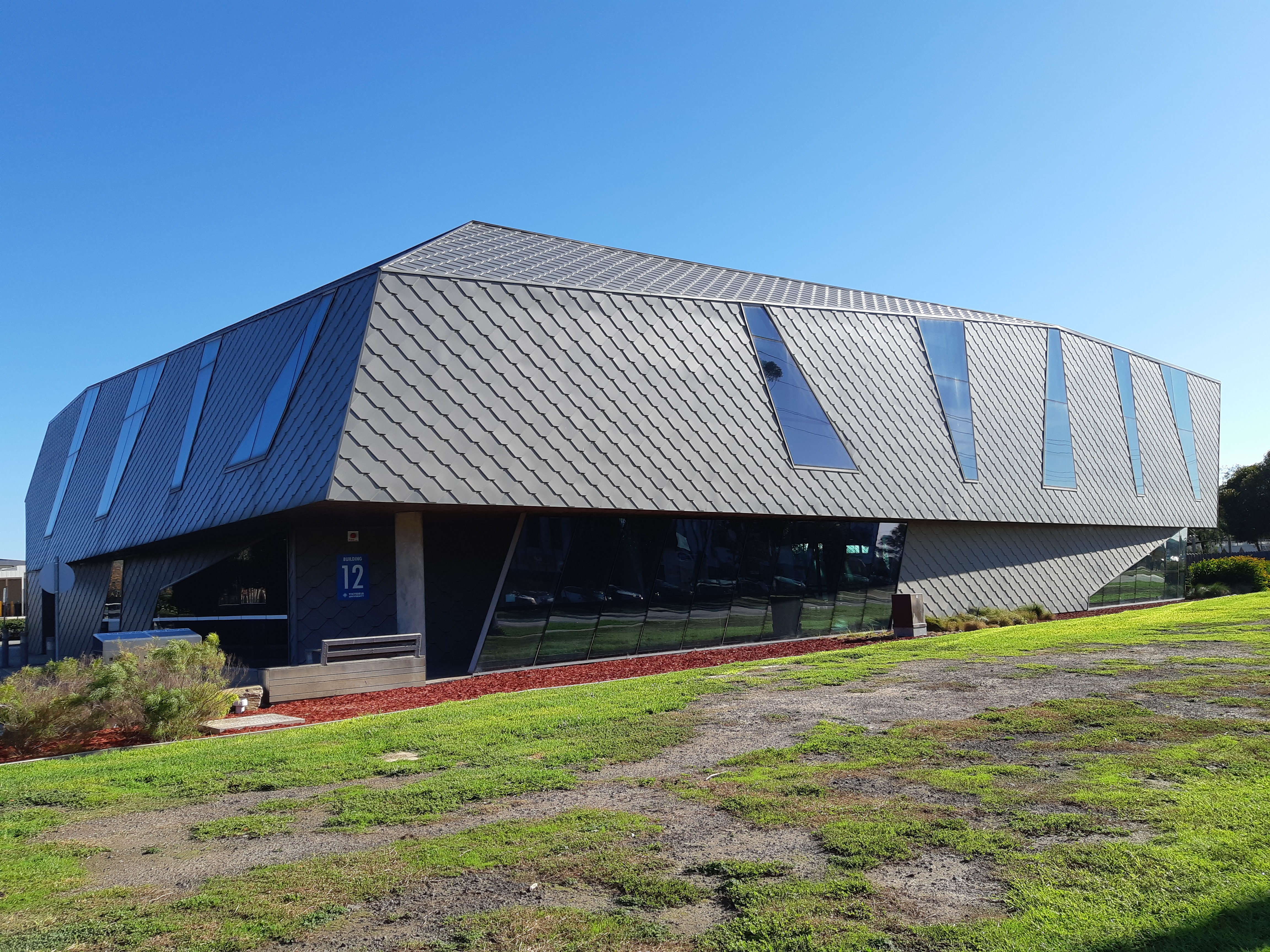 Kampus Weribee Universitas Victoria